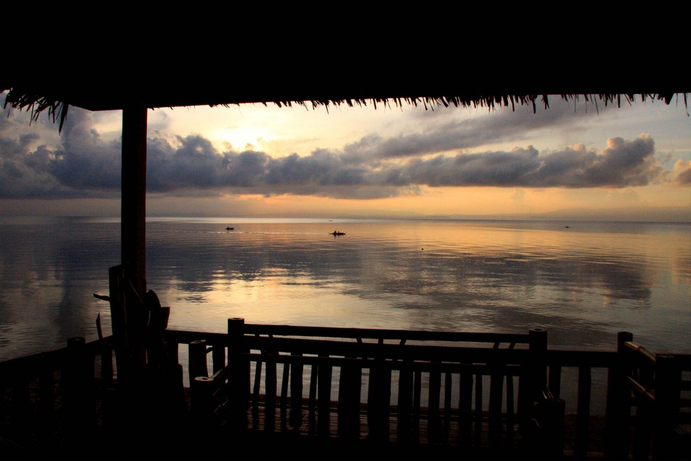 La Libertad, Negros Oriental, Philippines